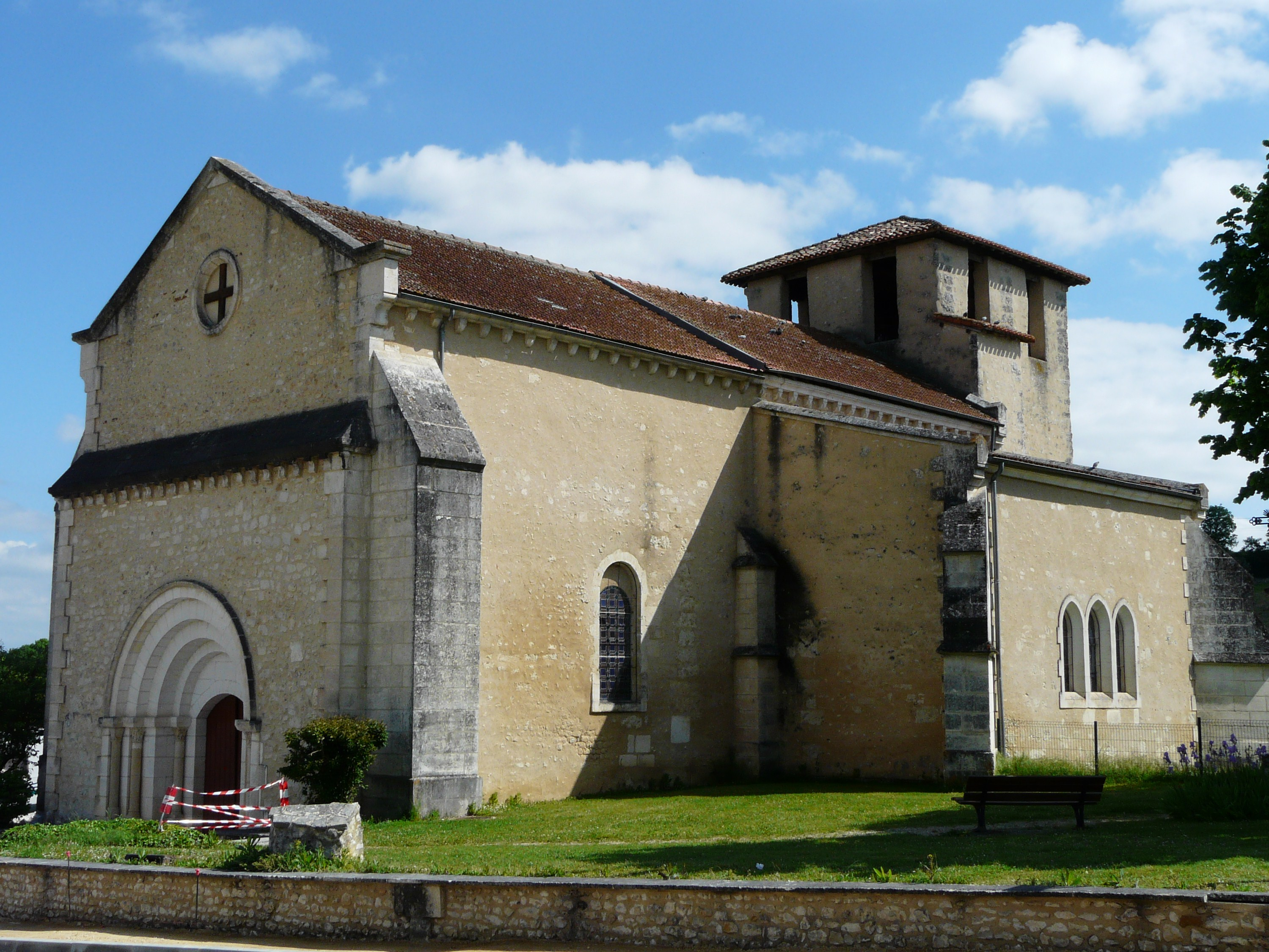 L'église de Coursac, Dordogne, France.